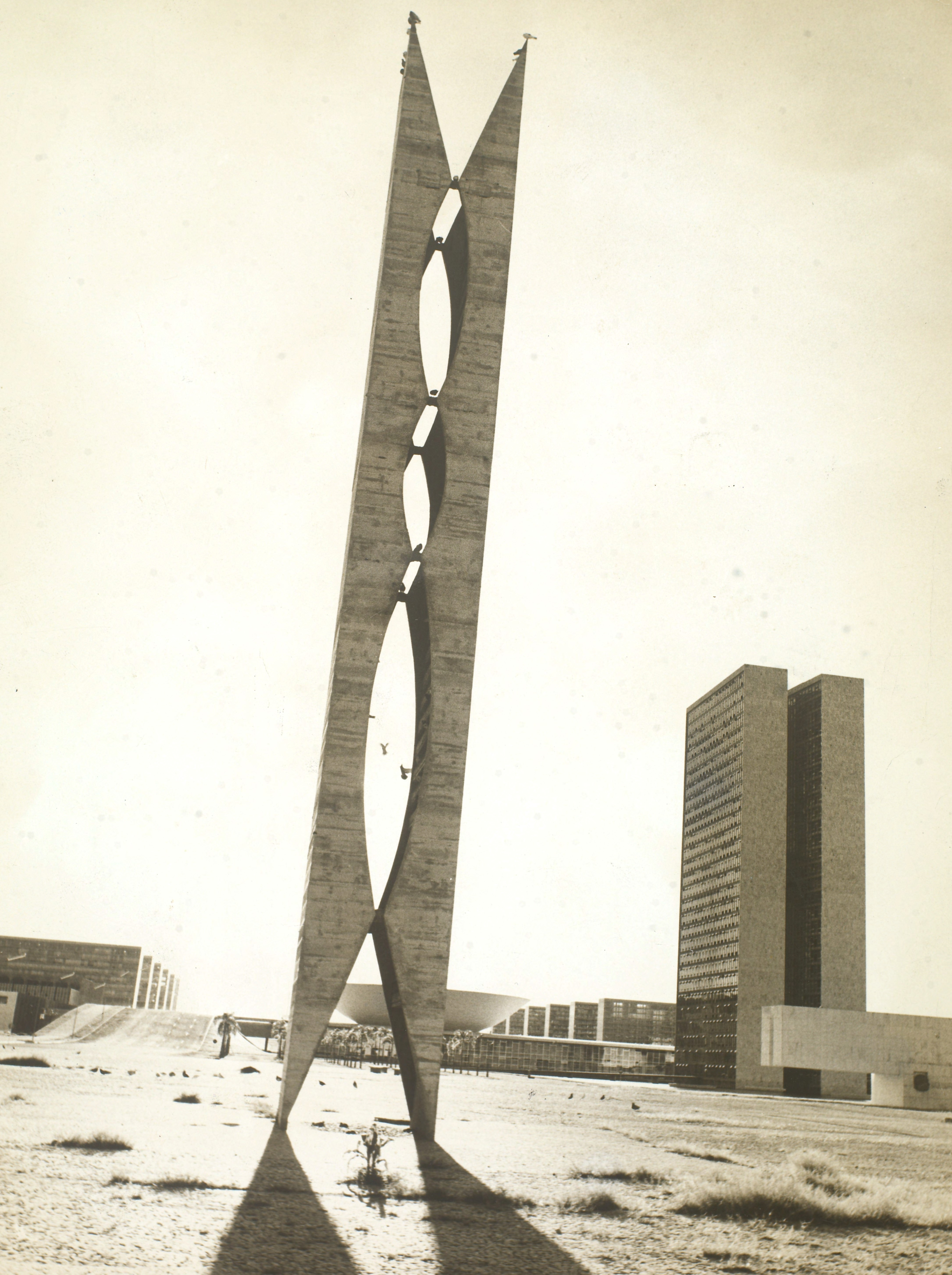 Fotografia do Fundo Correio da Manhã, sob a guarda do Arquivo Nacional.